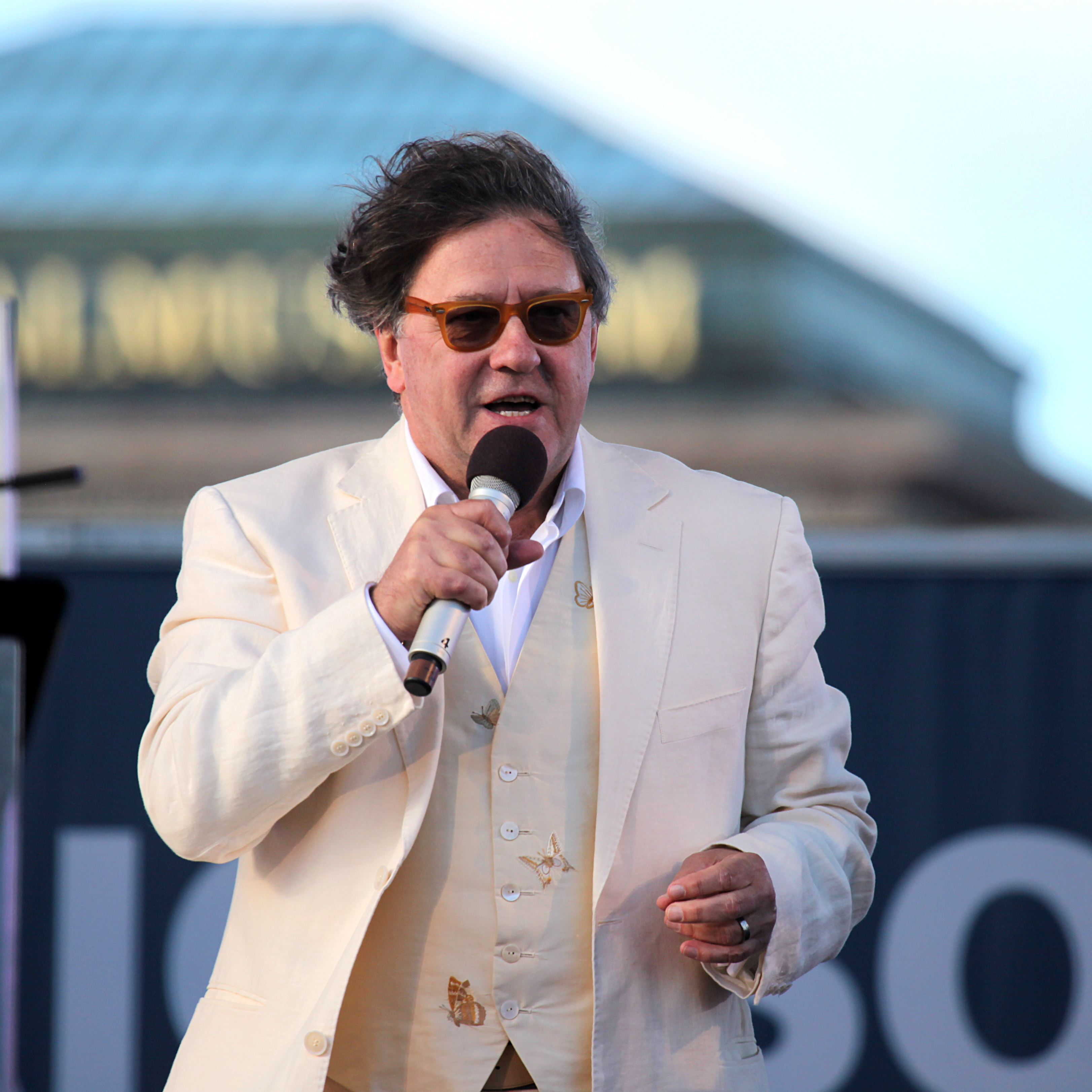 Tommy Körberg at Volvo Ocean Race in Stockholm 2009